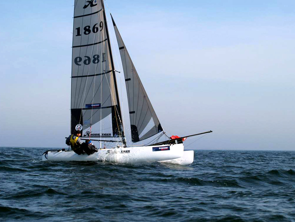 Hobie Cat Tiger, purjehduskilpailu, Suomen Urheiluveneliitto, Helsinki